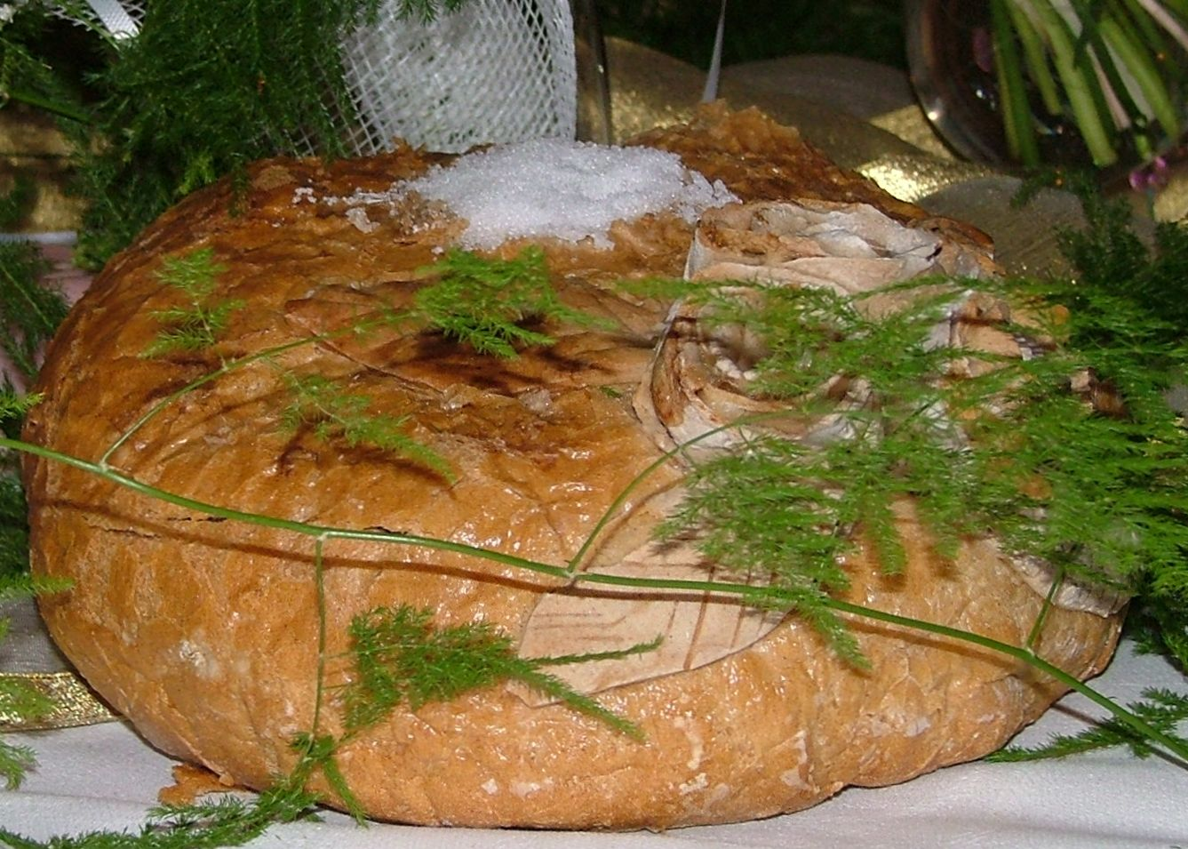 Chleb i sól